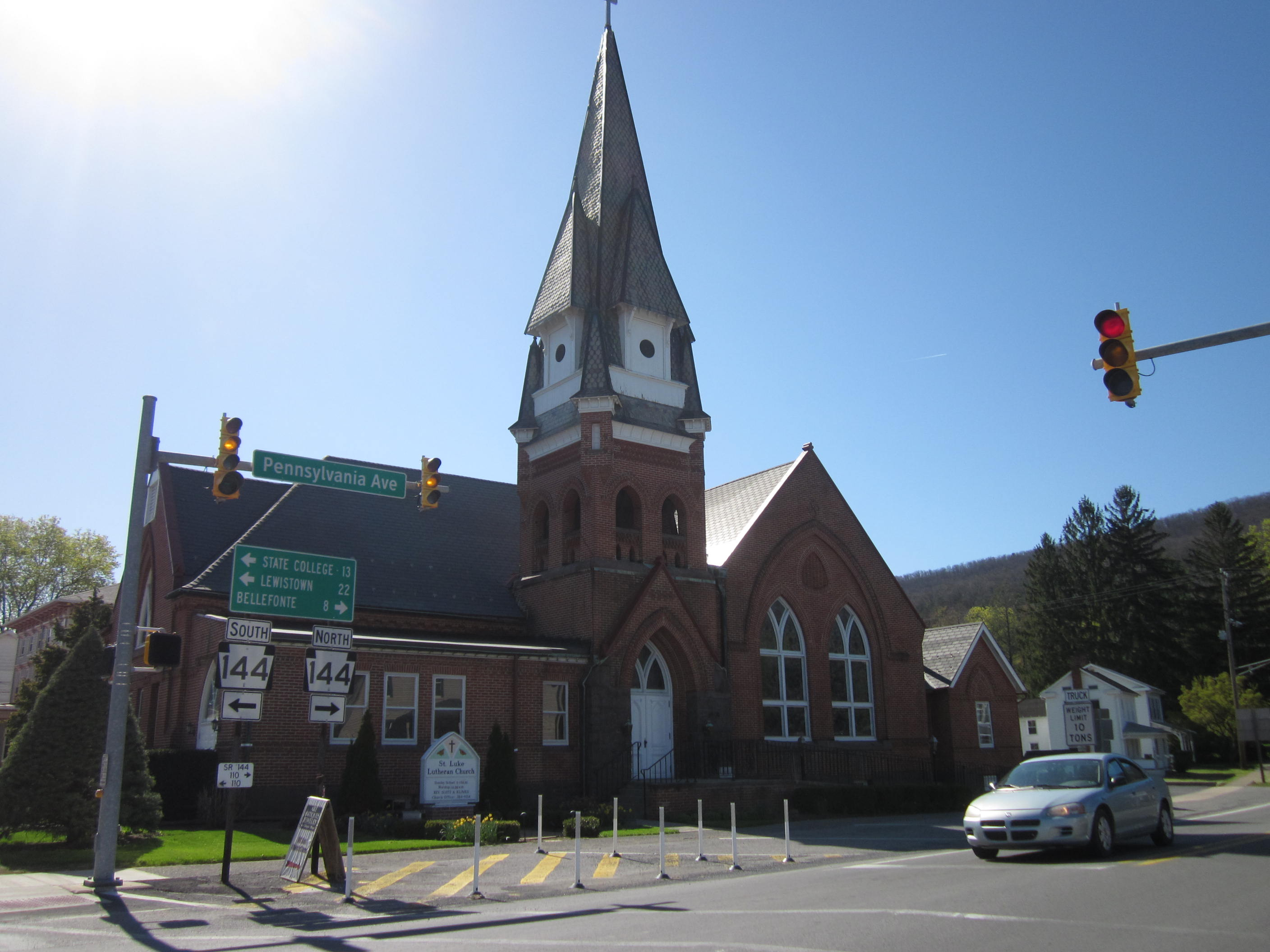 Centre Hall, Pennsylvania